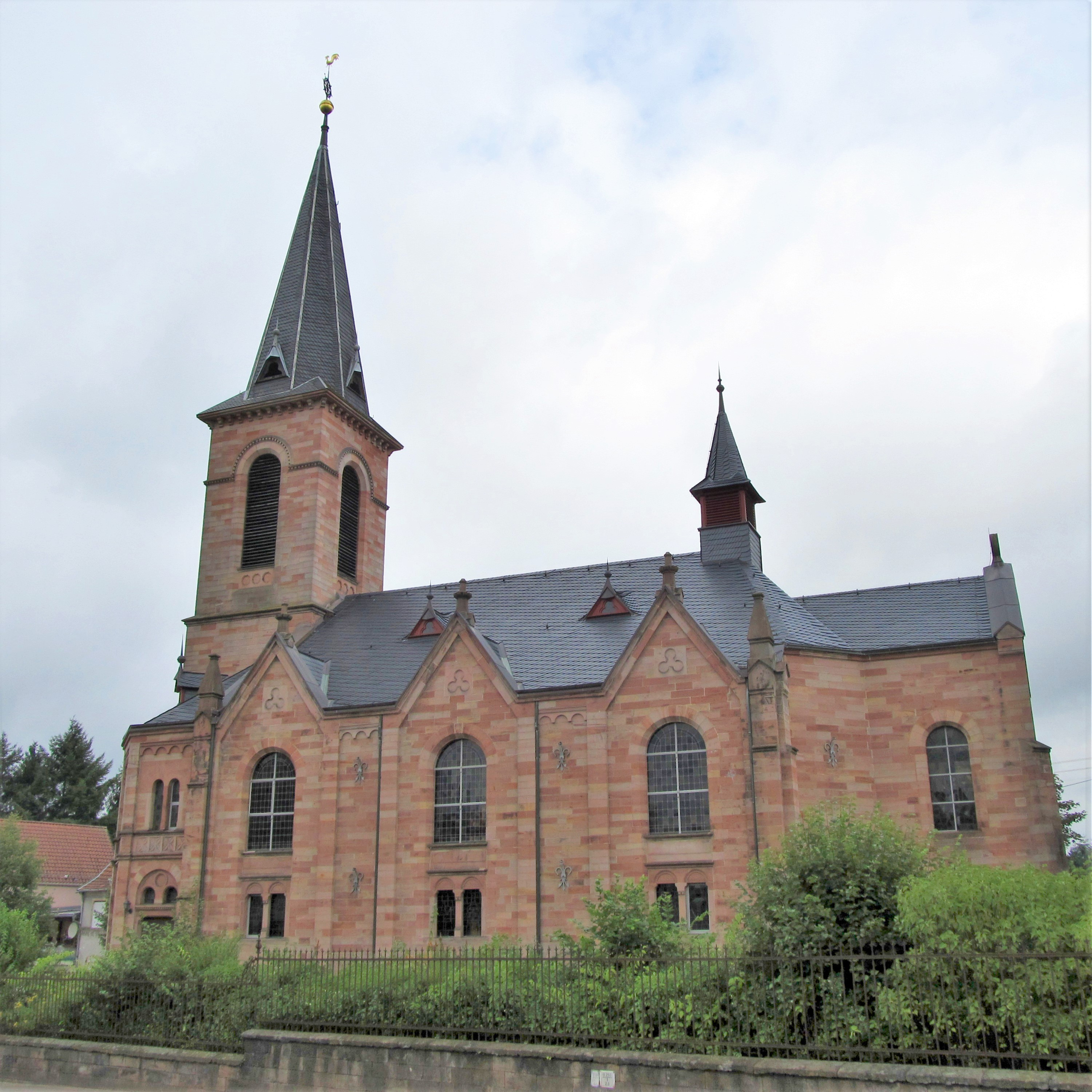 Die protestantische Kirche in Bexbach, Saarland